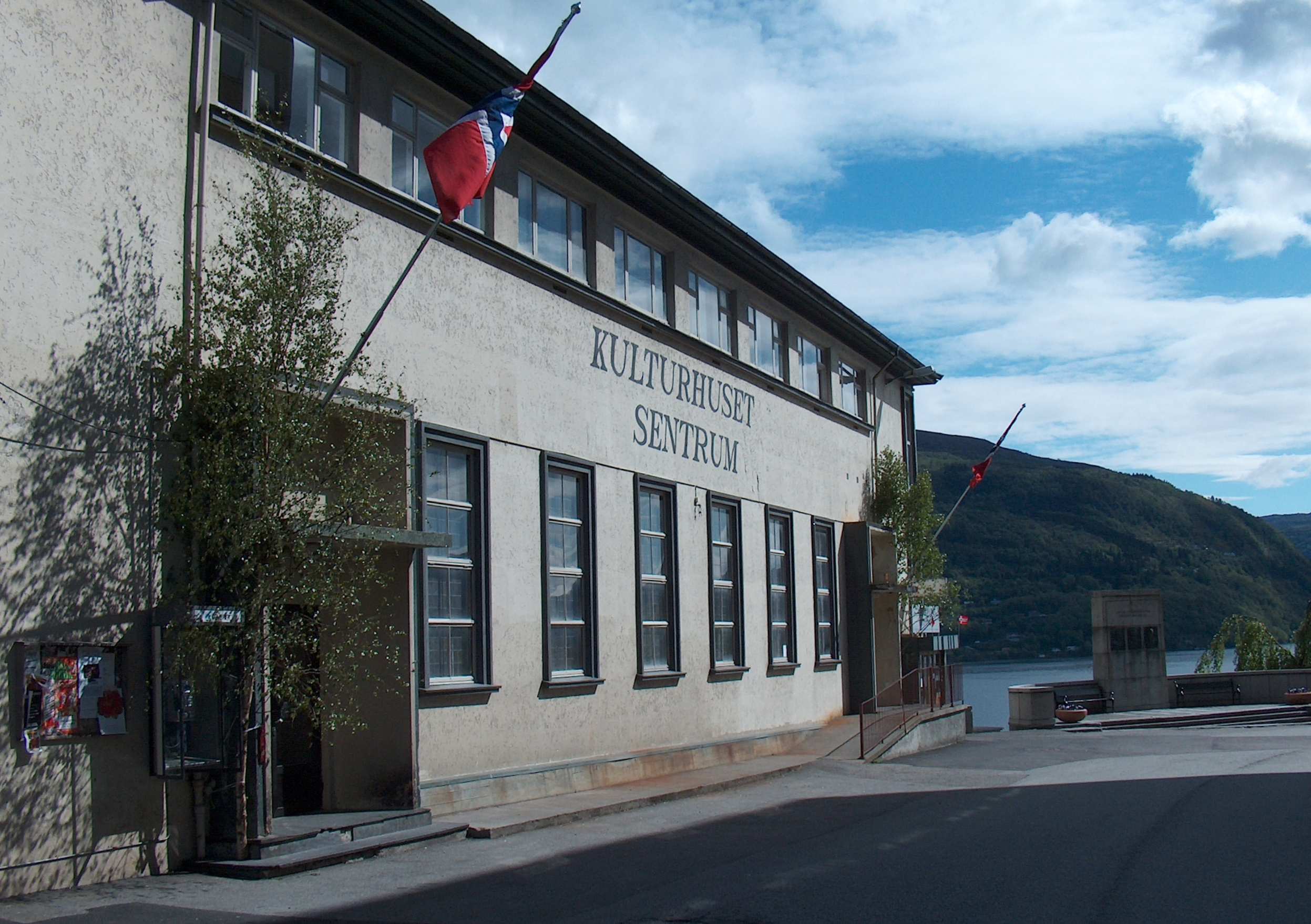 Kulturhuset Sentrum, Peter Jebsens veg 4, Ytre Arna (Bergen)